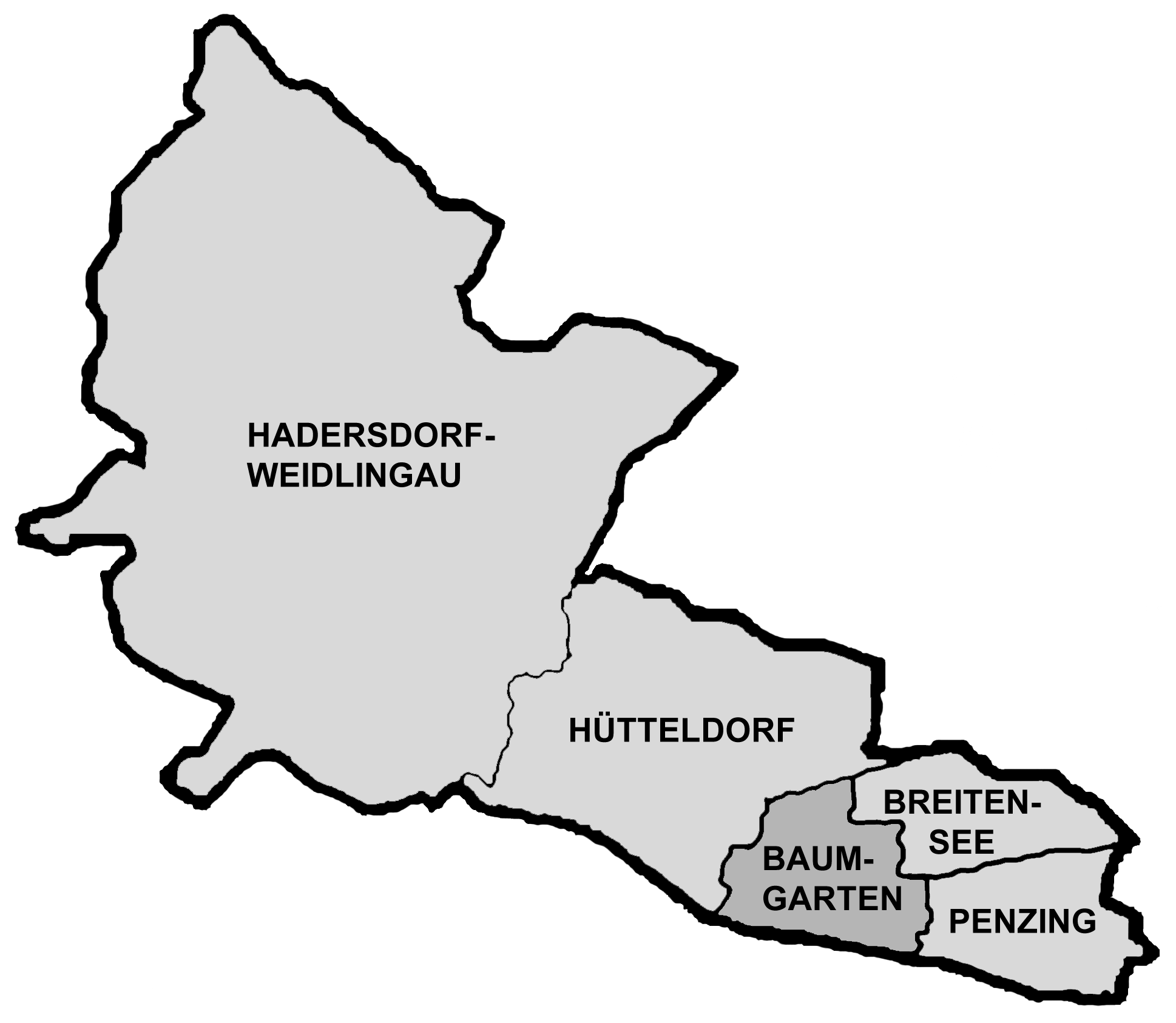 Positionskarte des Penzinger Bezirksteils Baumgarten in Wien